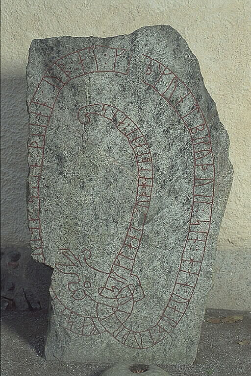 Inskriften lyder: Vifast (lät) resa upp denna sten efter Gudmund, sin broder. Hona blev död i Särkland. Gud hjälpe hans ande. Motiv: U785 Tillinge kyrka Nyckelord: Runor Kategori: (01) Exteriörer, detaljer, Runristning/runsten Inskriften lyder: Vifast (lät) resa upp denna sten efter Gudmund, sin broder. Hona blev död i Särkland. Gud hjälpe hans ande.